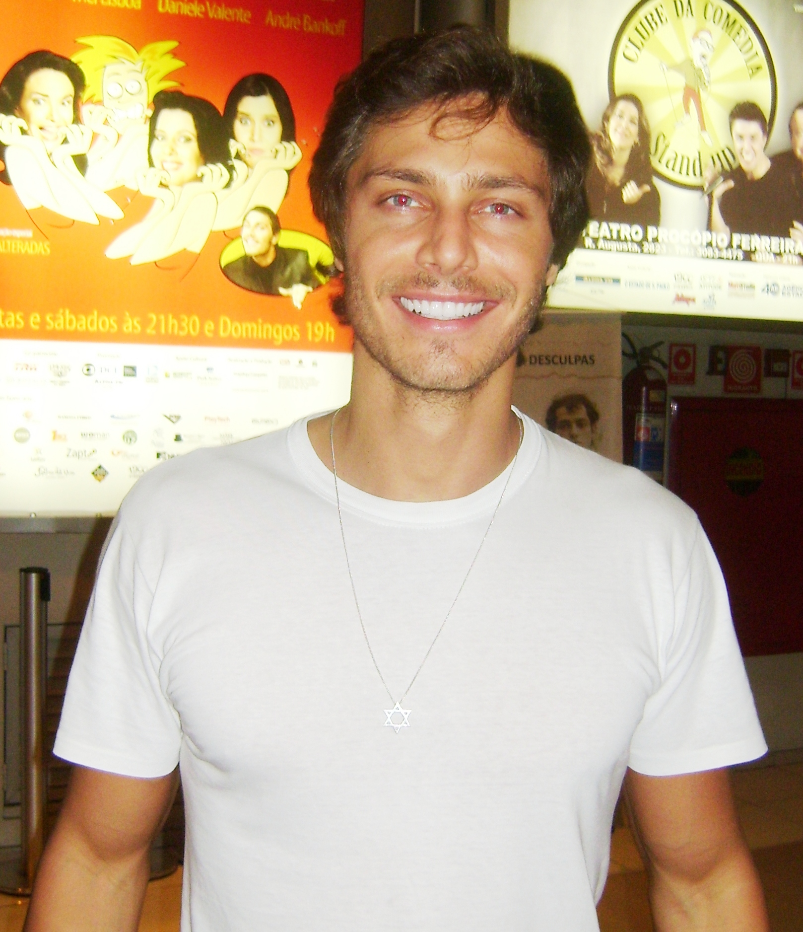 André Bankoff, ator brasileiro, após a apresentação da peça "Mulheres Alteradas", em São Paulo.